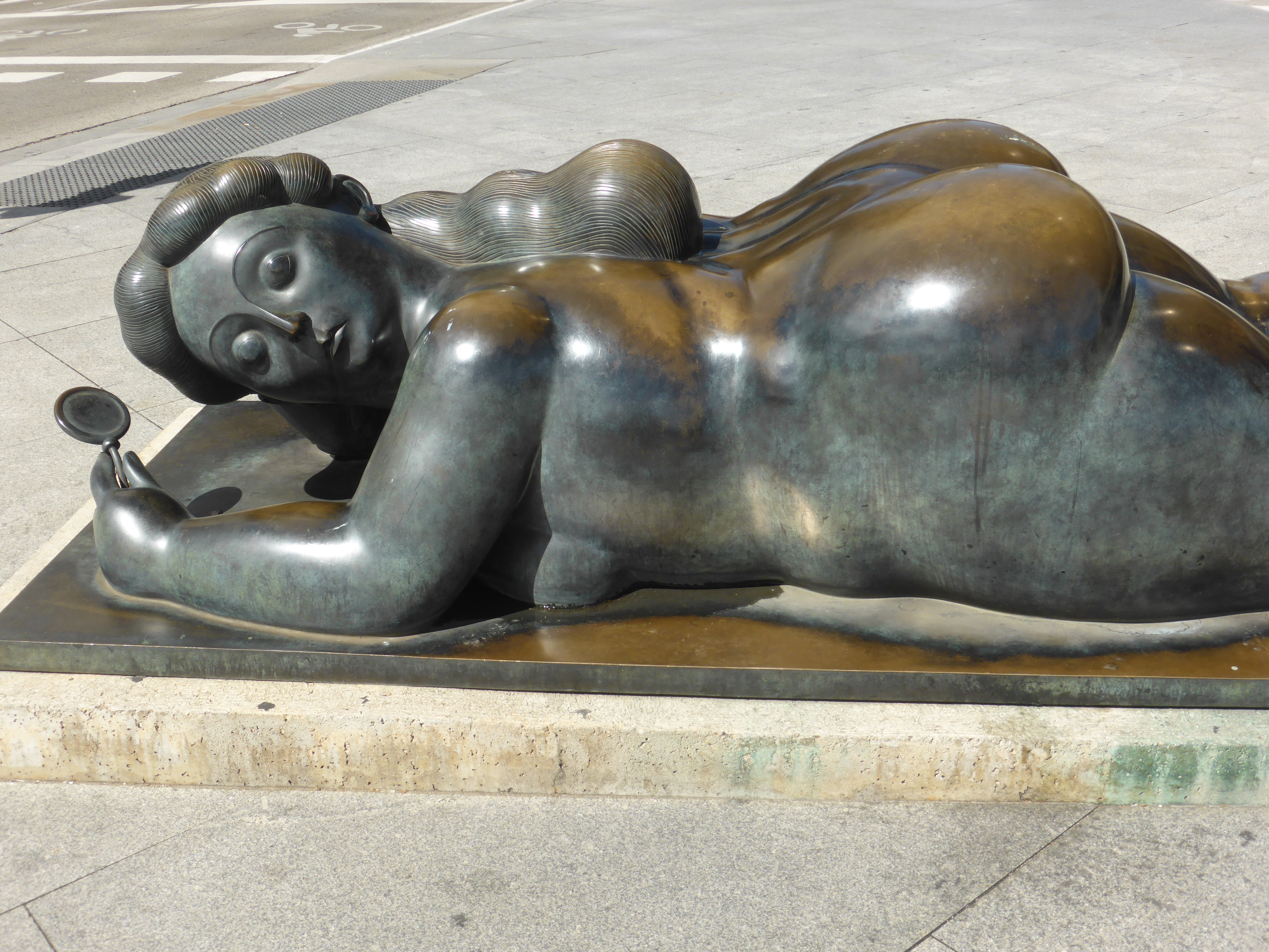 Esta escultura se encuentra en Madrid, desde el año 1994. Fue regalada por el artista colombiano Fernando Botero, tras una exposición urbana. En la base está firmada: "Botero 3/3".